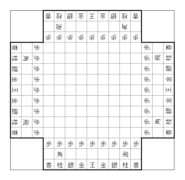 四神将棋にて使用される将棋盤の配置図